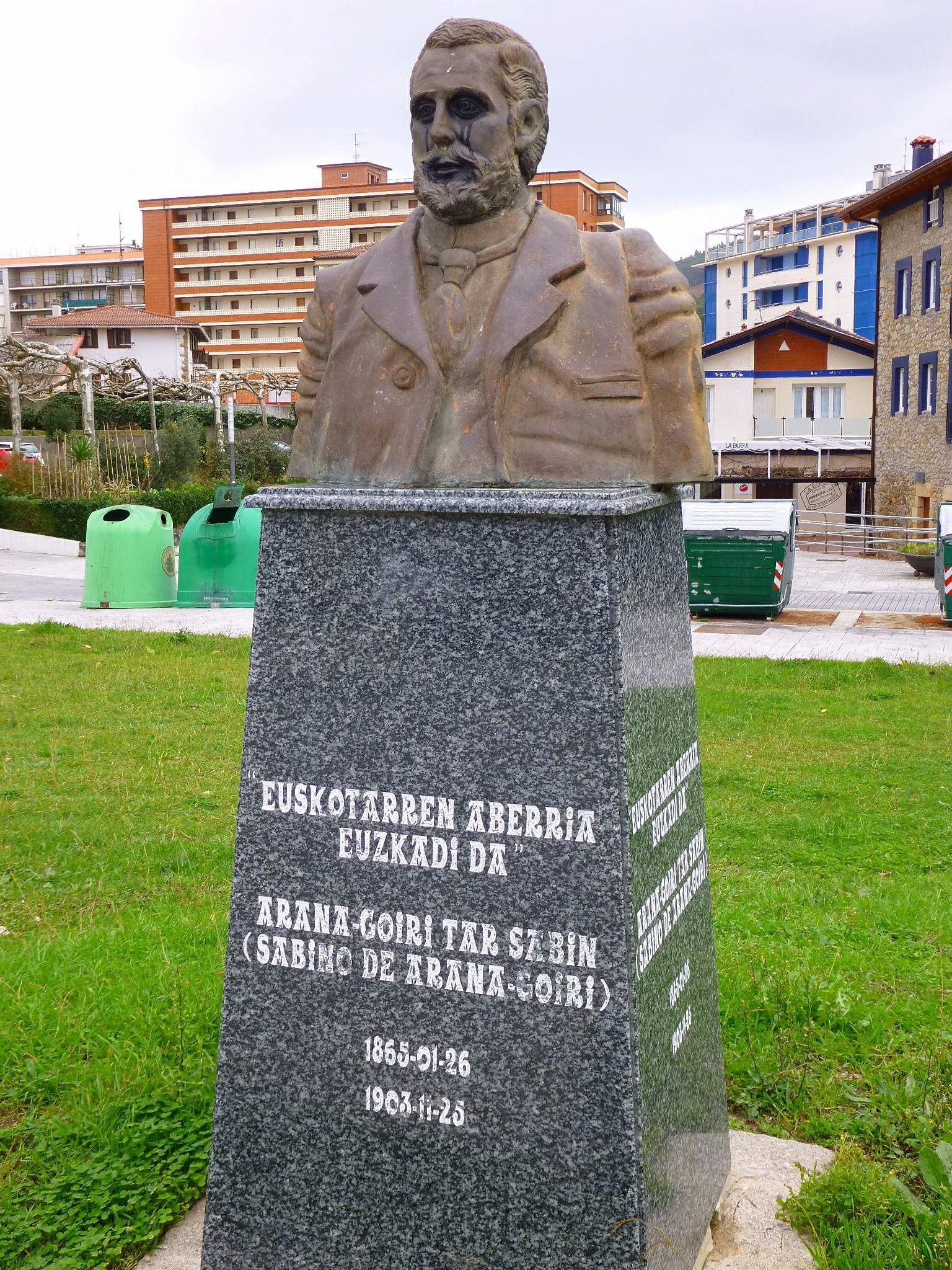 escultura de Sabino Arana en Bakio (Bizkaia)